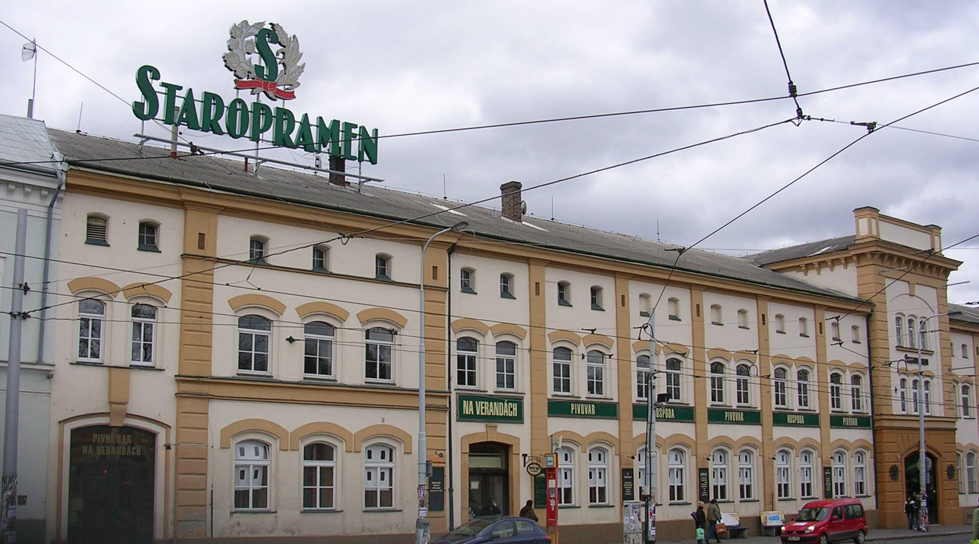 Praha, Smíchov, pivovar Staropramen